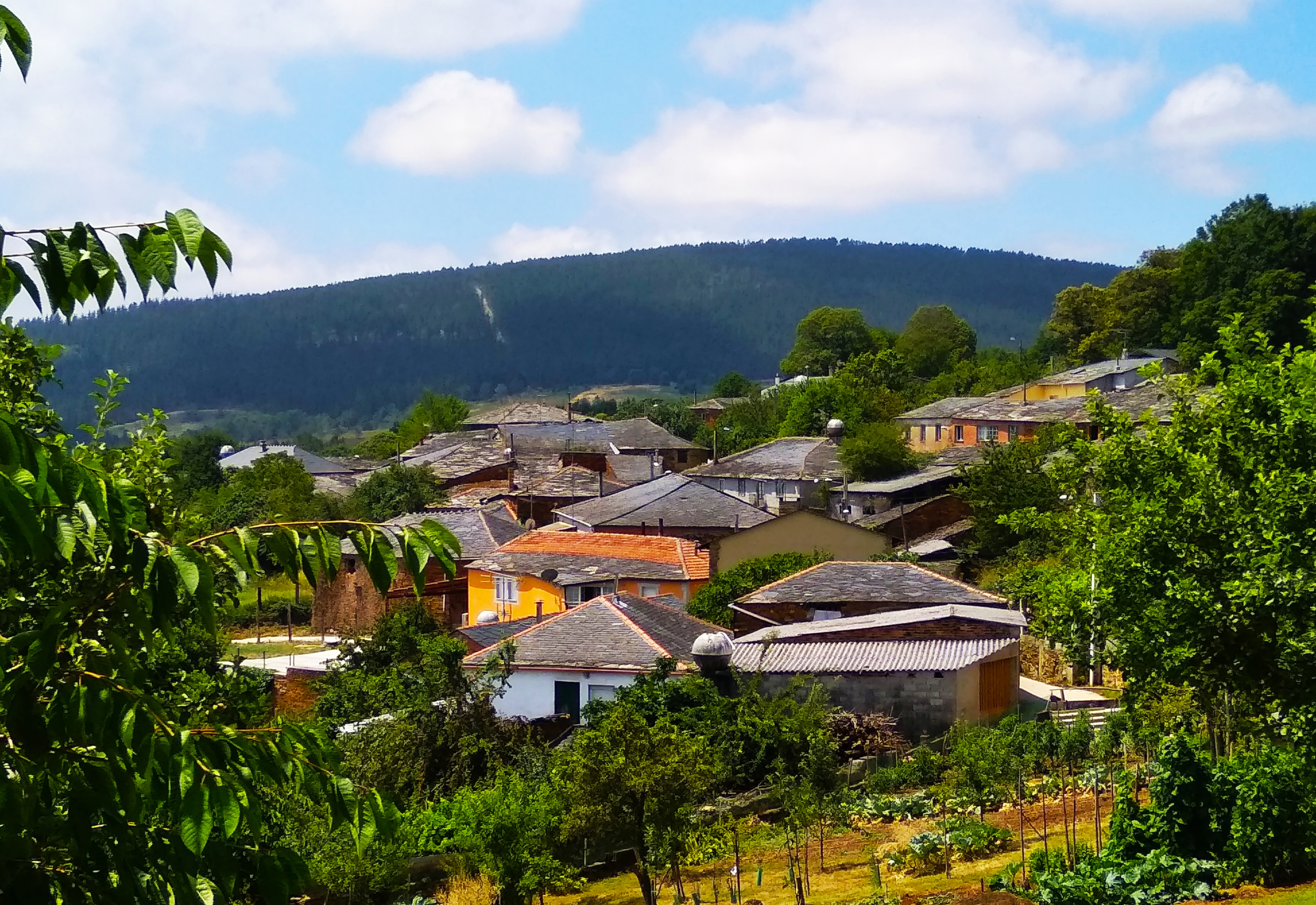 Vista da parroquia de Remesar, no concello de Bóveda (Lugo)